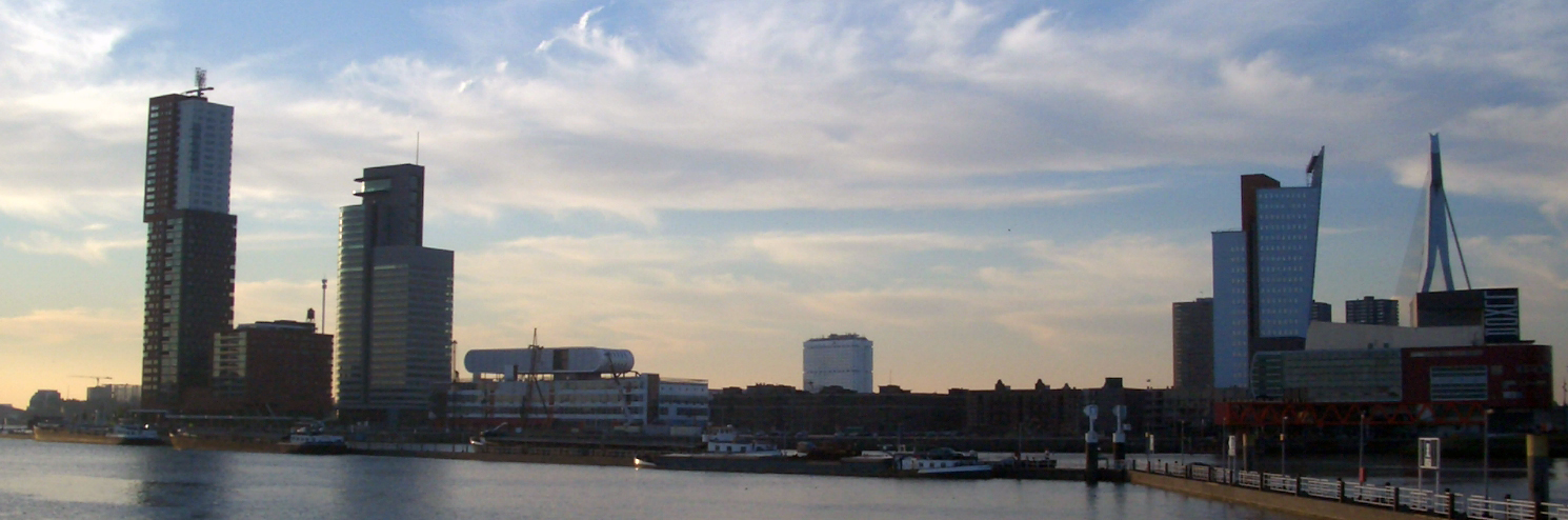 Skyline Rotterdam Hafen